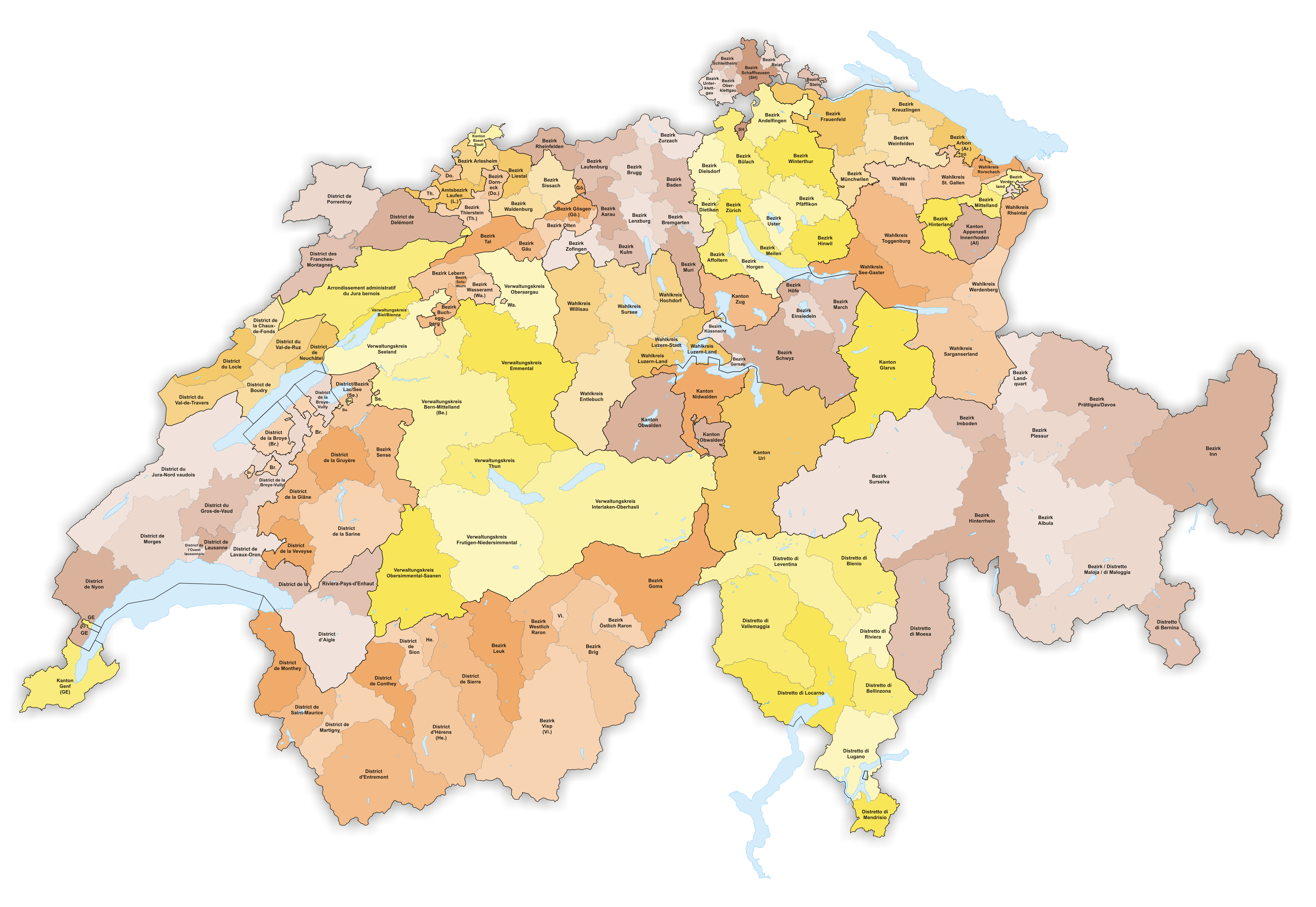 Districts in Switzerland